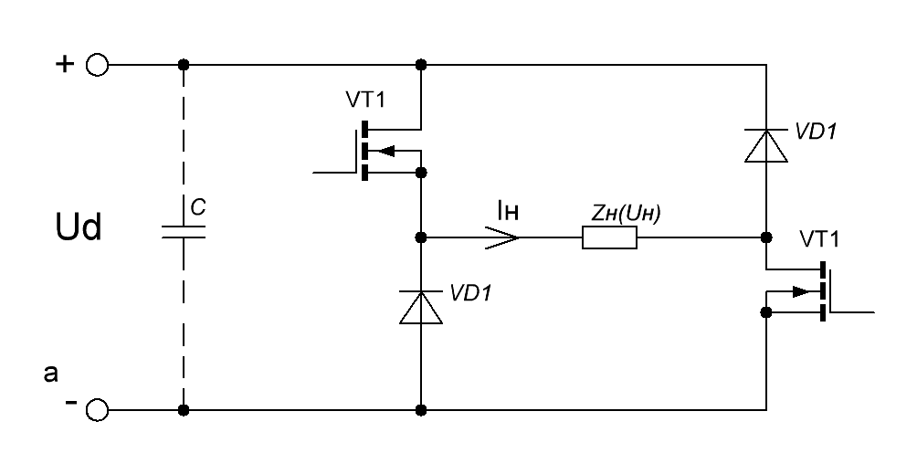 Преретворювач